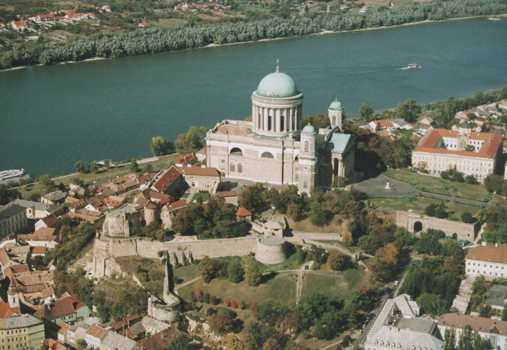 Basilica of Esztergom - Esztergom - Hungary - Europe